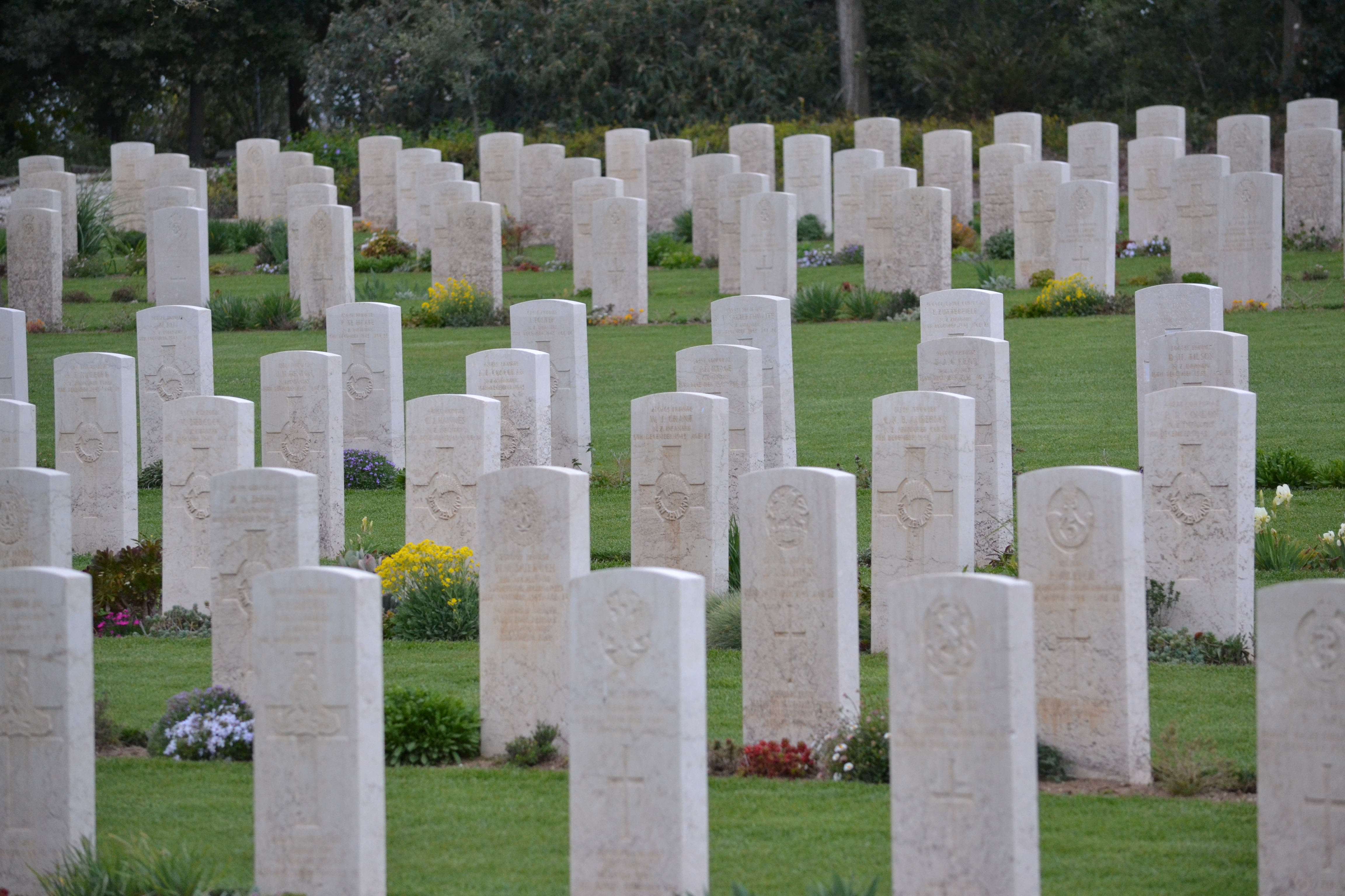 Cimitero militare britannico di Torino di Sangro, dove sono sepolti militari del Commonwealth britannico caduti durante la seconda guerra mondiale.